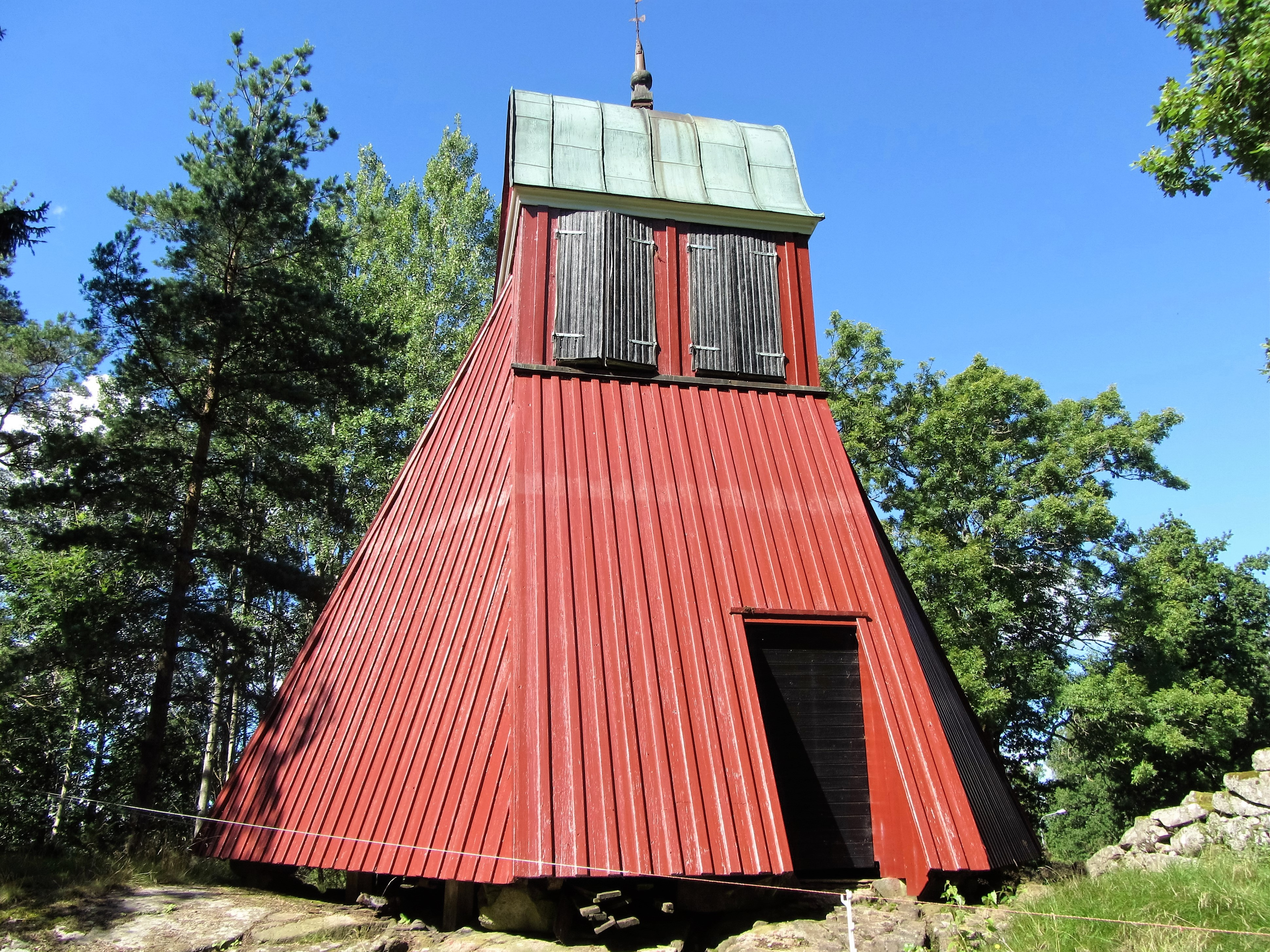 Klockstapeln strax utanför kyrkogårdsmuren söder om Torps kyrka i Dalsland.